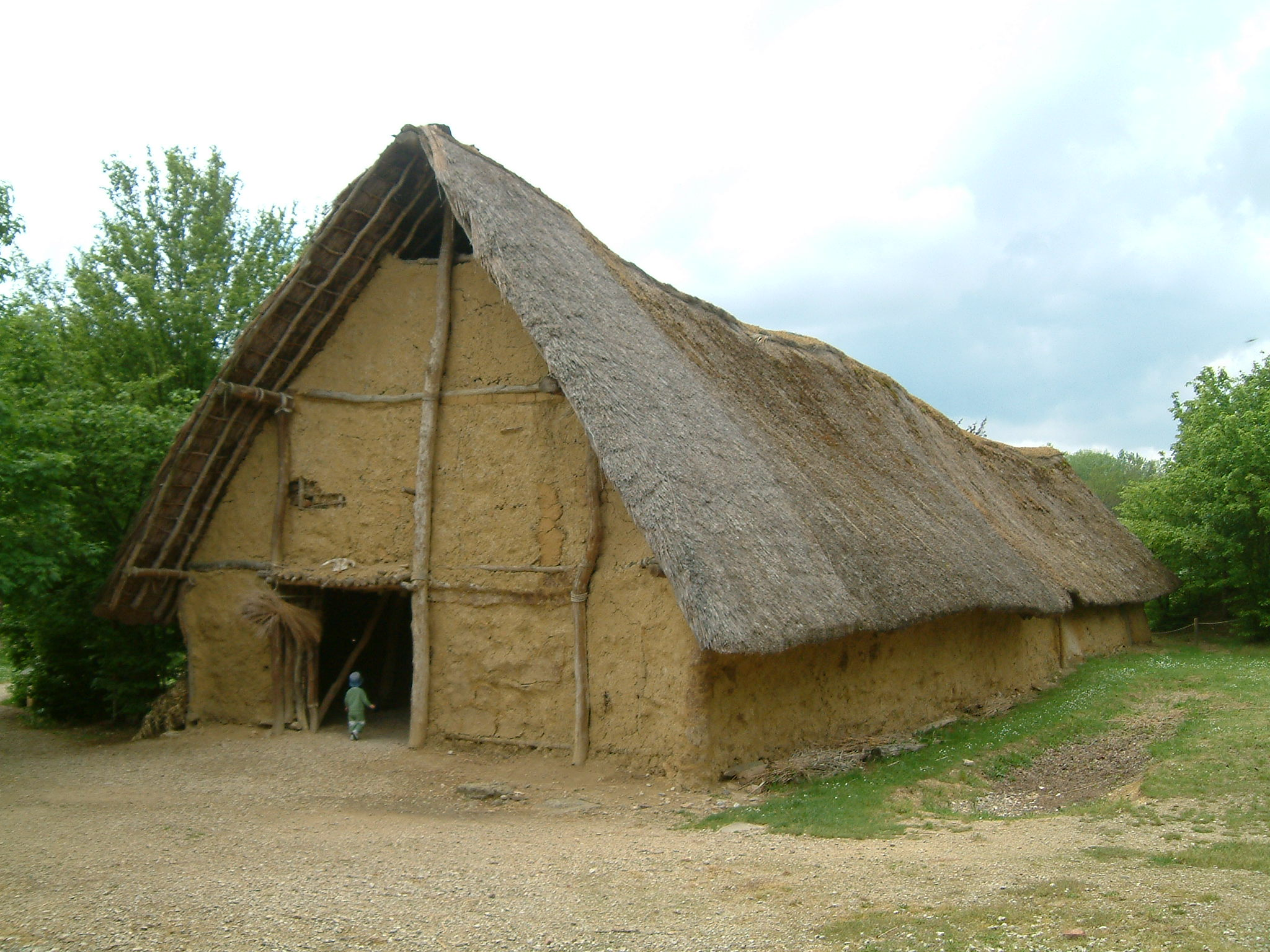 Archéodrome de Beaune, Merceuil, Bourgogne, FRANCE.